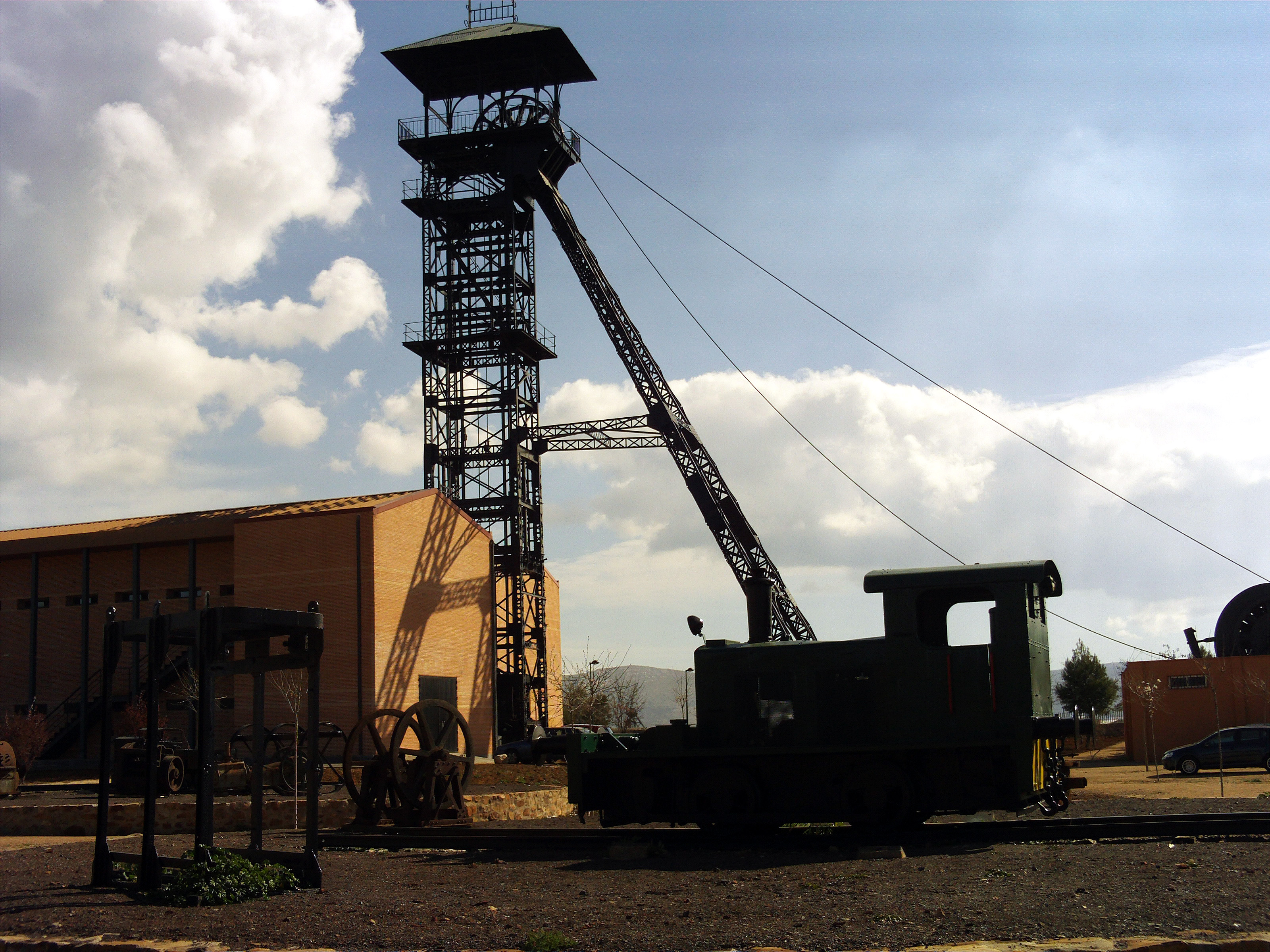 Museo de la Minería de Puertollano, Puertollano, Castile-La Mancha, Spain.